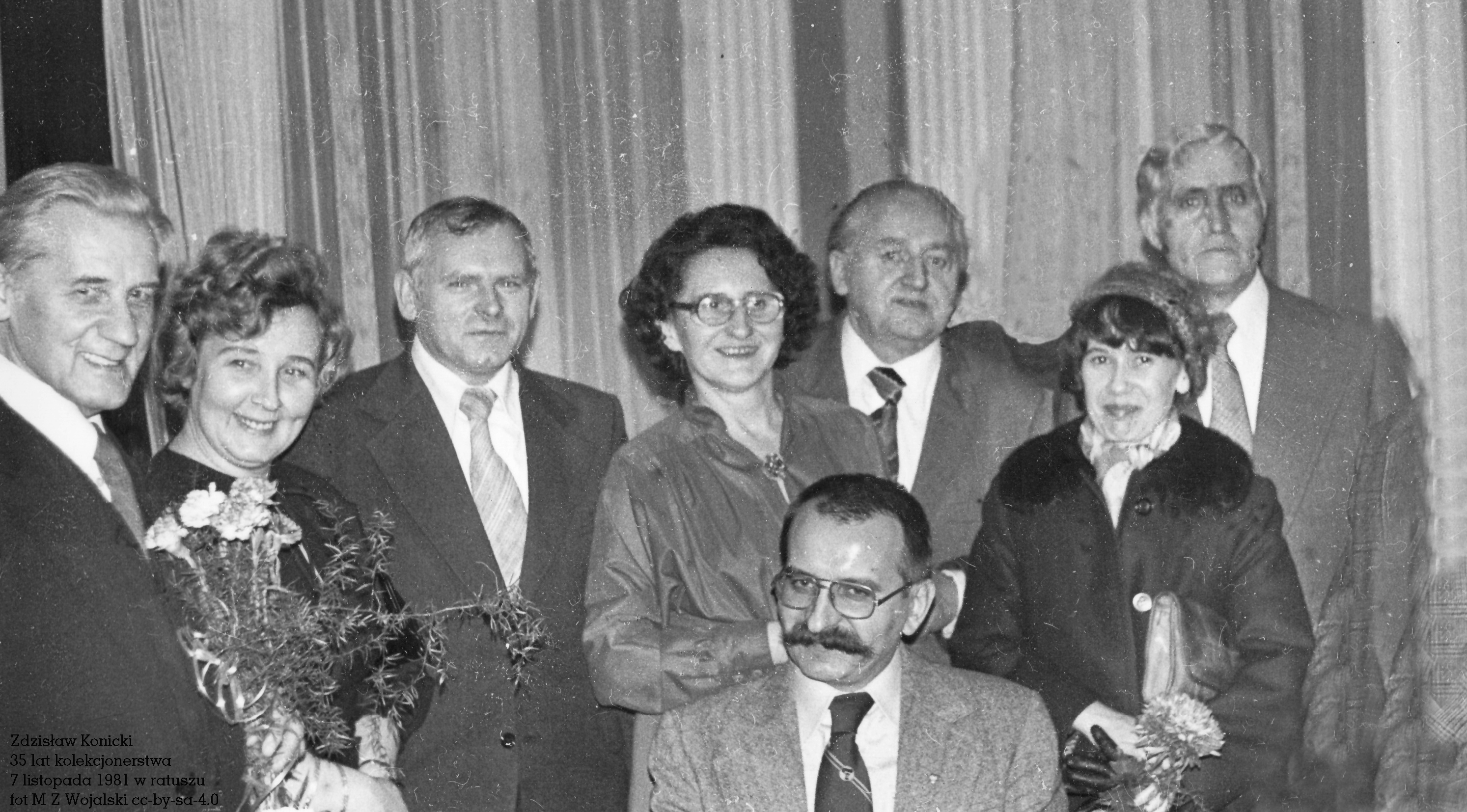 Zdzisław Konicki 7 listopada 1981 Jubileusz 35 kolekcjonerstwa w łódzkim ratuszu fot M Z Wojalski od prawej Stanisław Łukawski Zofia Radzikowska Zdzisław Konicki, Janusz Karol Barański Henryk Szubert